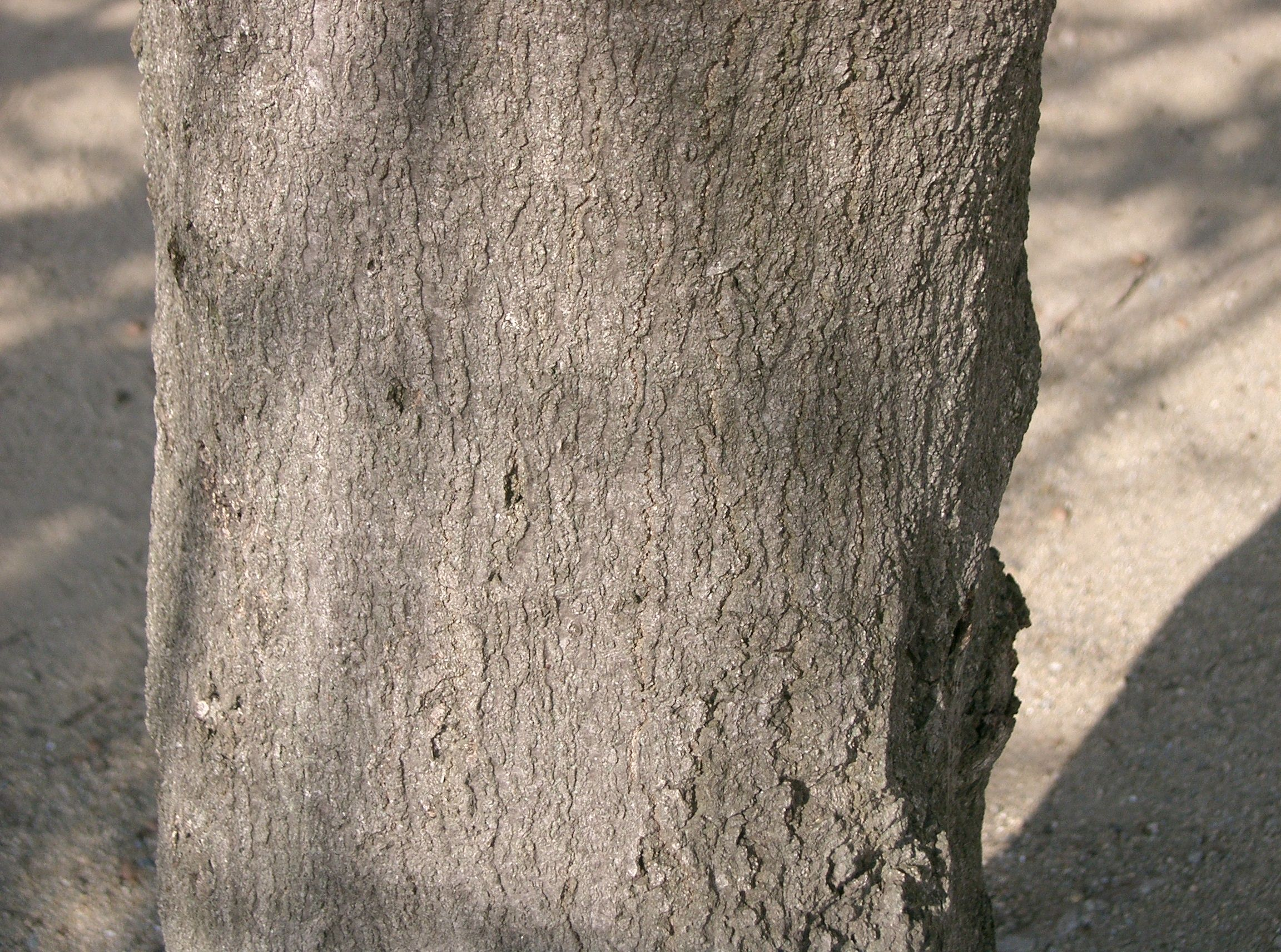 Scientific name Quercus glauca